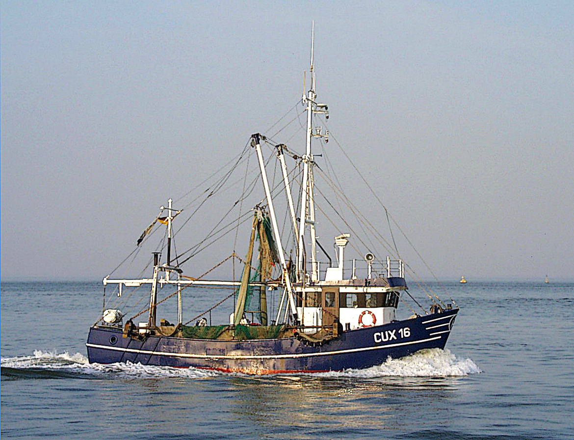 Ein Krabbenkutter kommt zurück CUX 16 - CRANGON